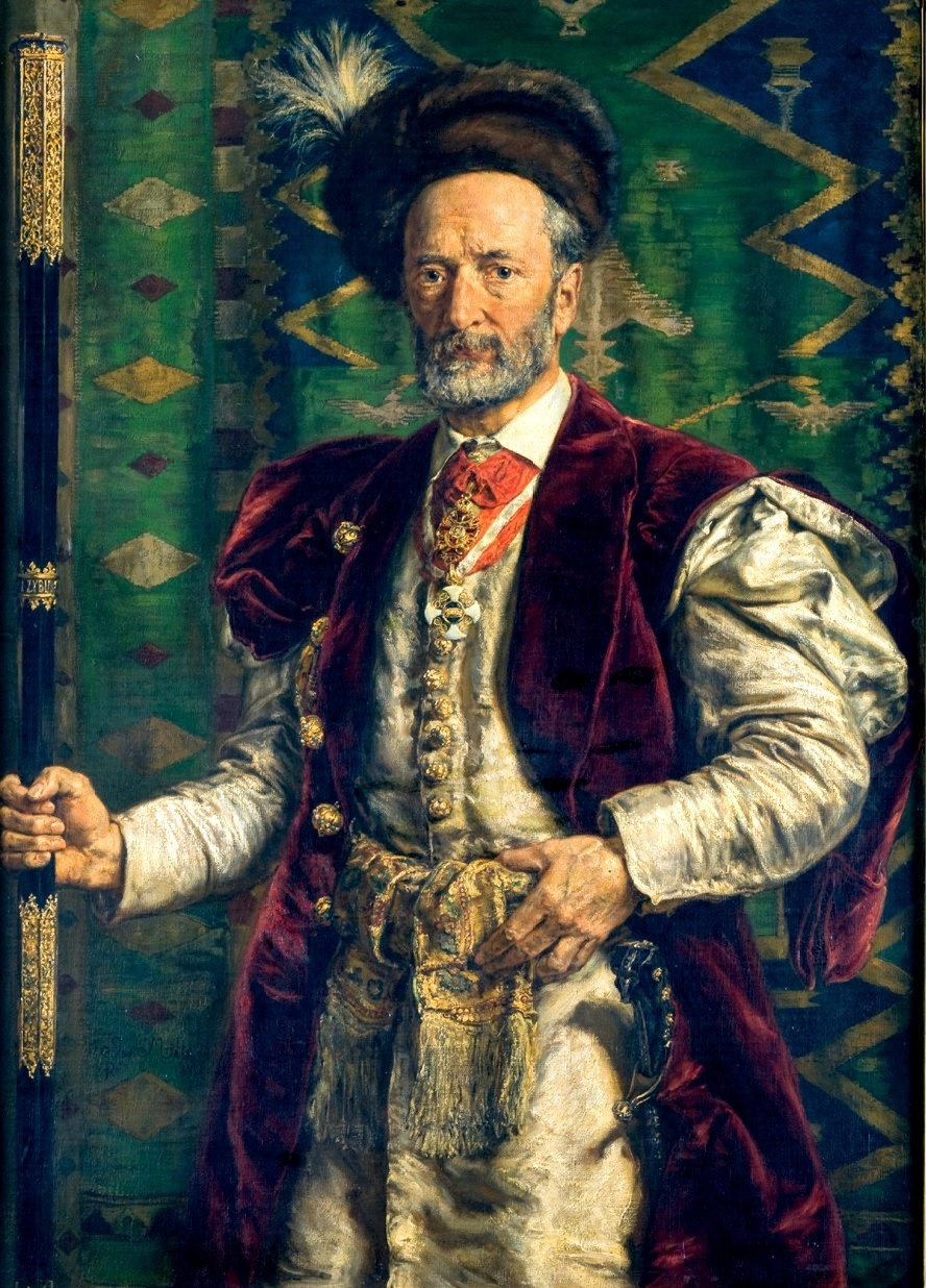 en: Portrait of Mikołaj Zyblikiewicz by Jan Matejko pl: Portret Mikołaja Zyblikiewicza, Jan Matejko